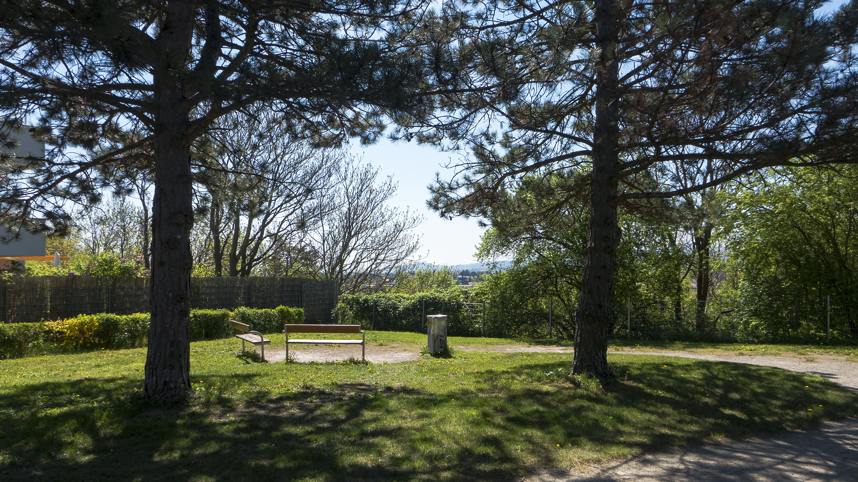 Bertha-Neumann-Park in Wien 23